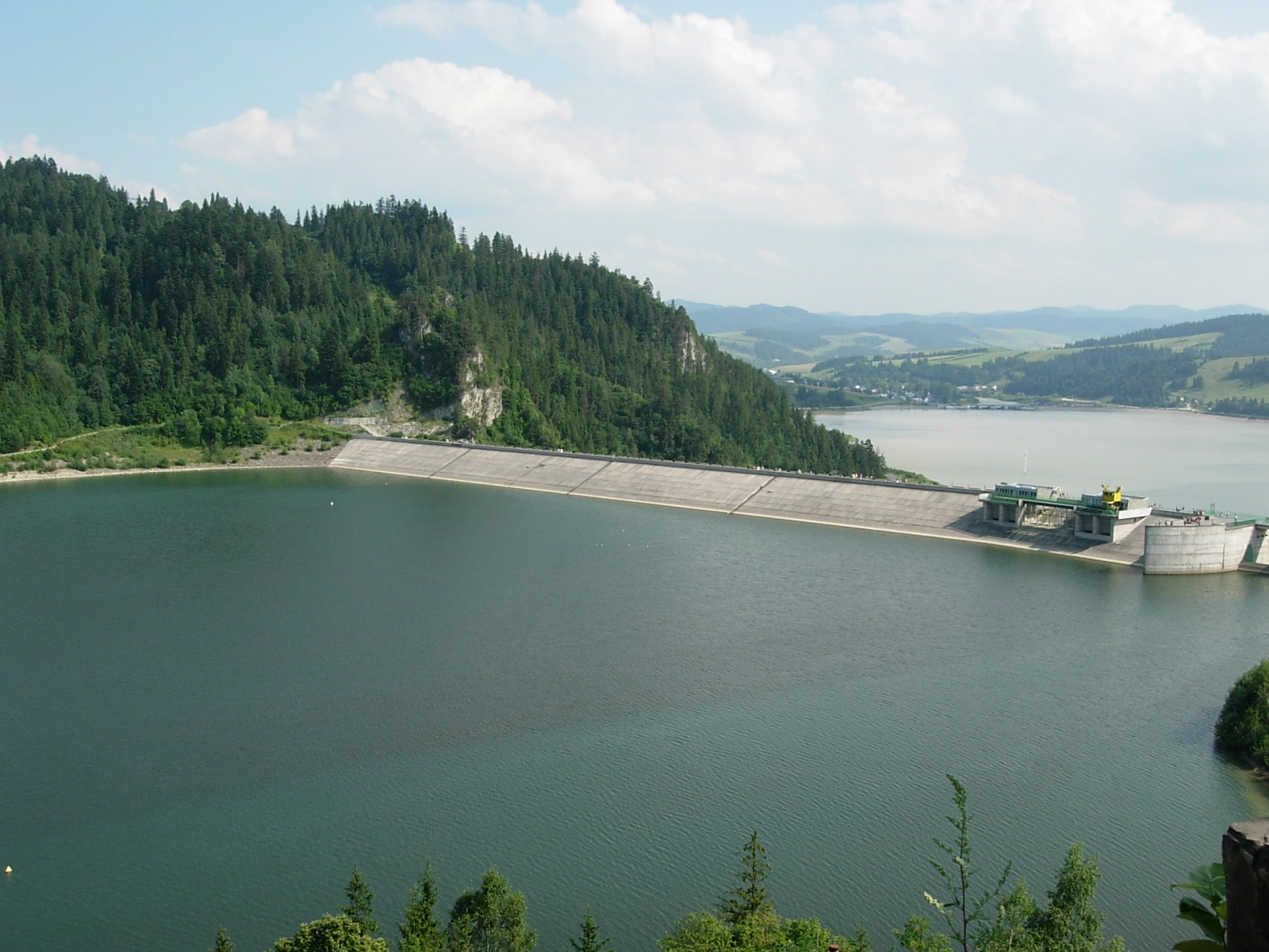 Zapora wodna na Zbiorniku Czorsztyńskim